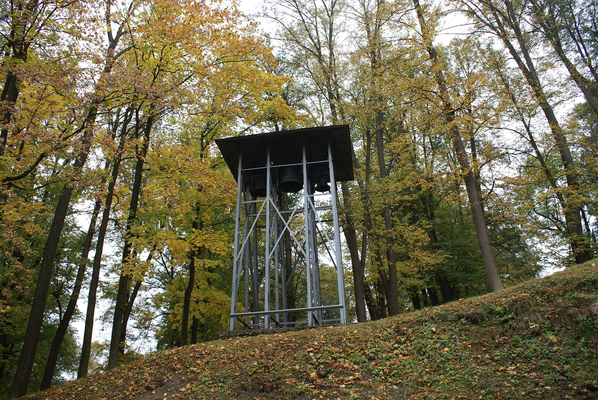 Kamienna Góra, miasto